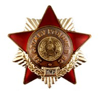 PMR state order